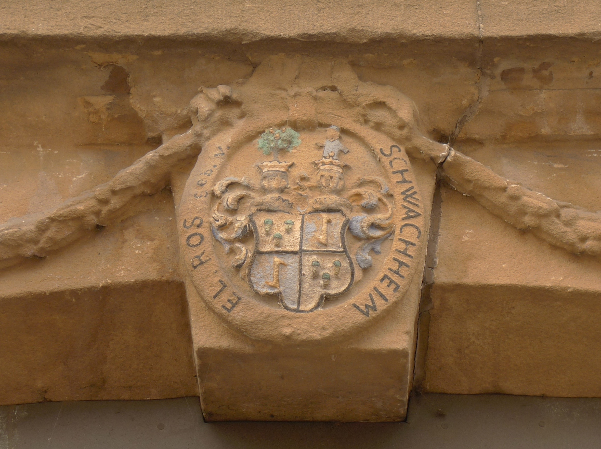 Wappen von Elisabeth Rosine Mörike geborene von Schwachheim (1742–1808), 1801, Mörike-Apotheke, Neuenstadt am Kocher